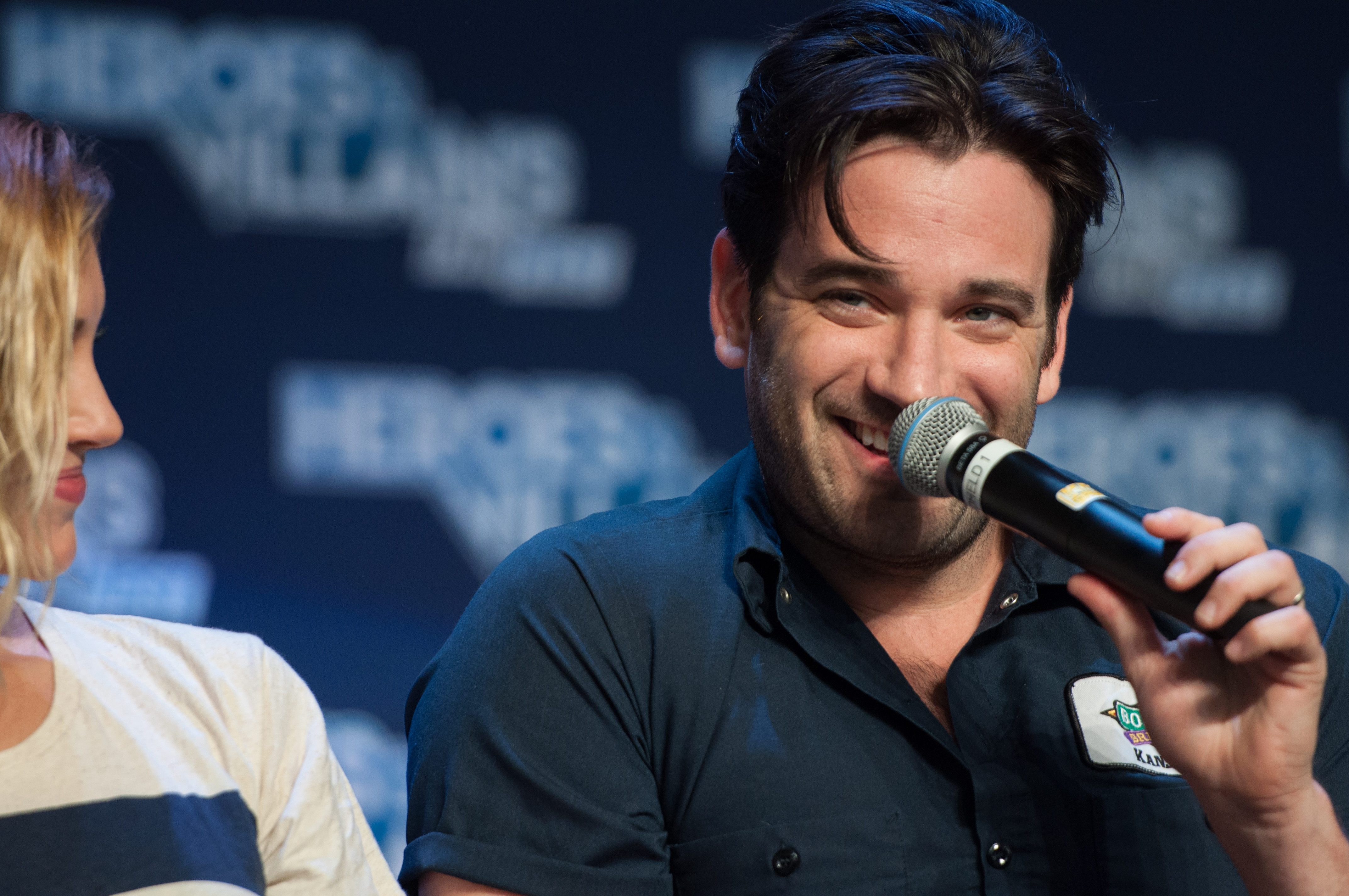 Arrow2HVFFSJ2016-ALS-37.jpg